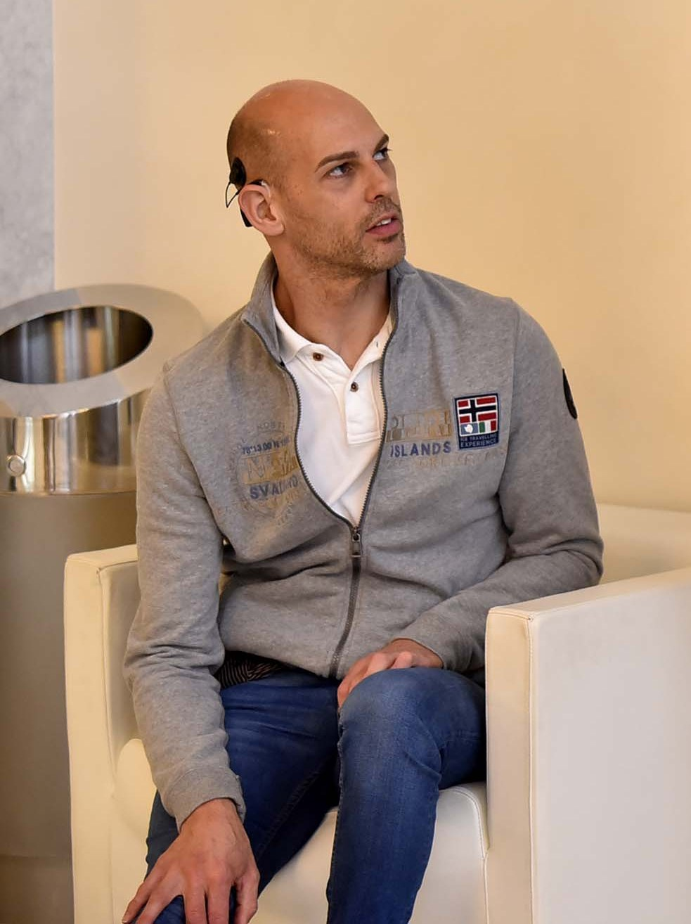 Richard Oribe en el XIV Festival de Derechos Humanos de San Sebastián (2016)